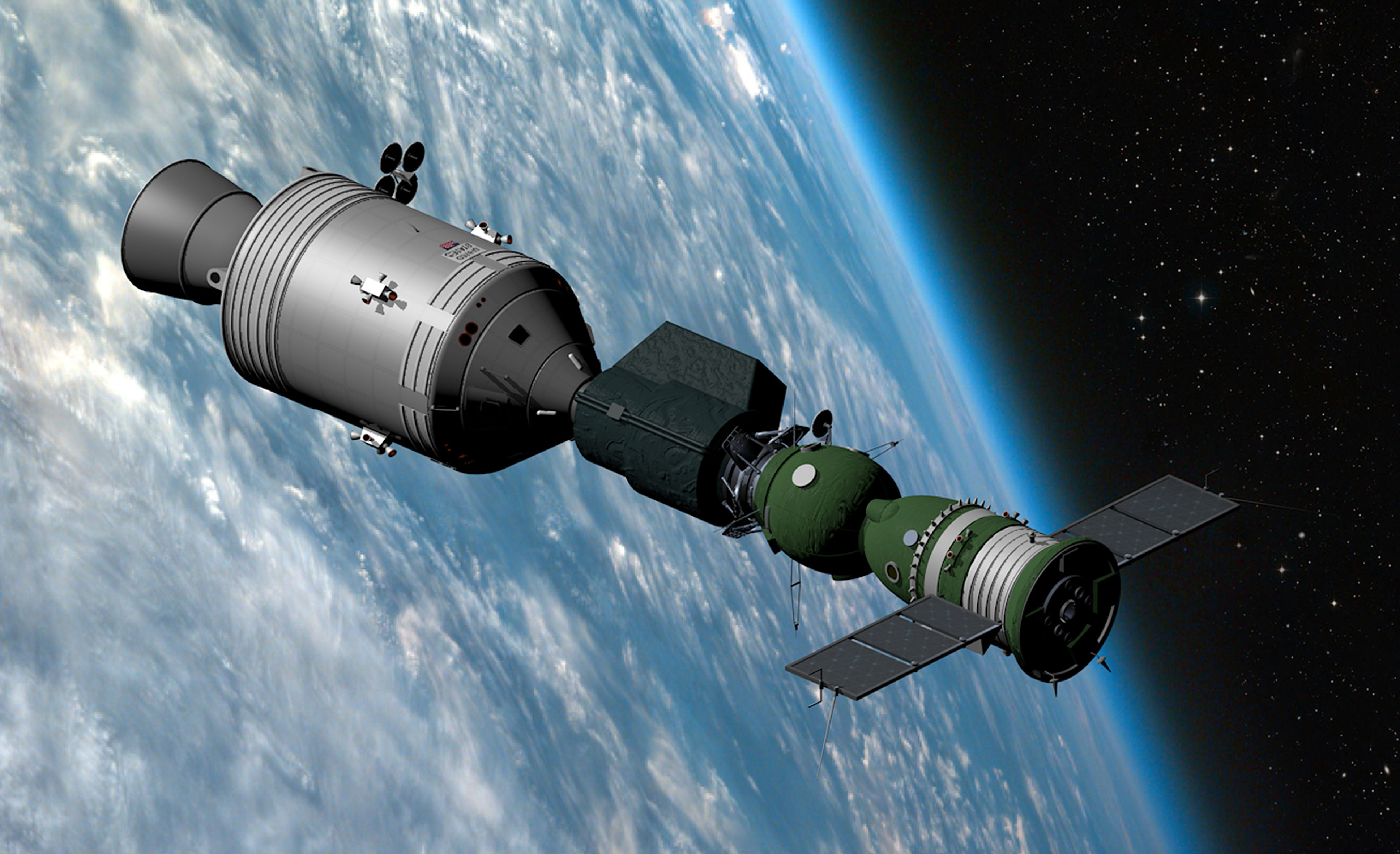 Apollo-Sojus Kopplungsmanöver ASTP